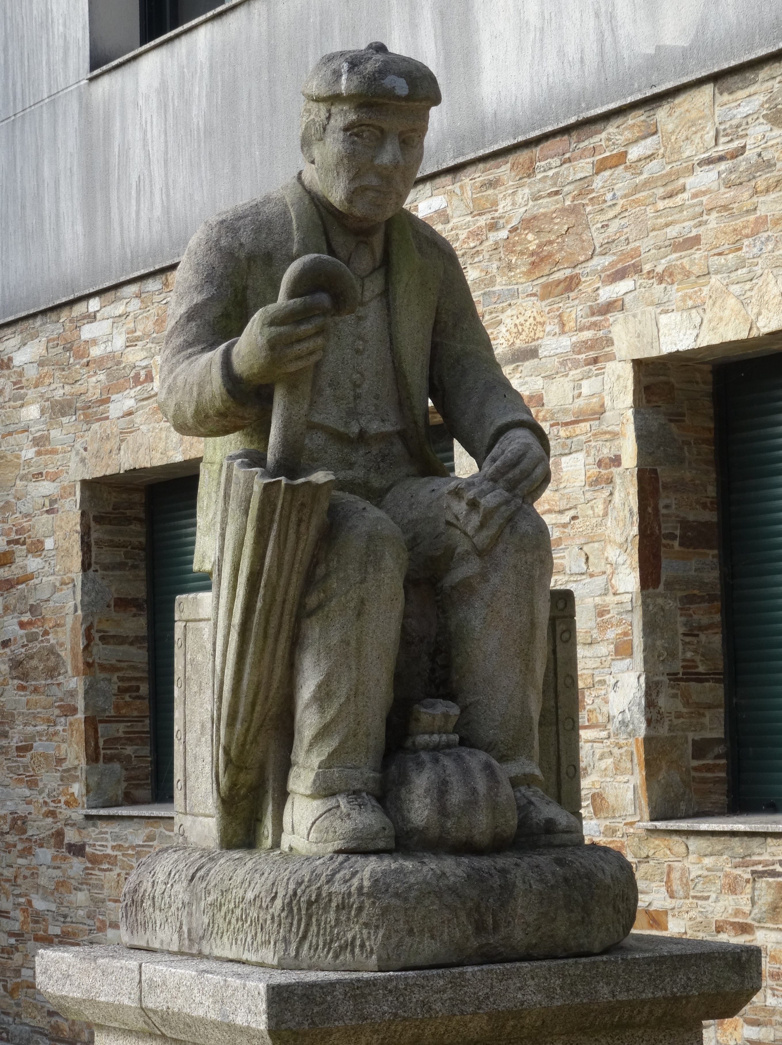 Escultura ó emigrante na praza do concello en Frades